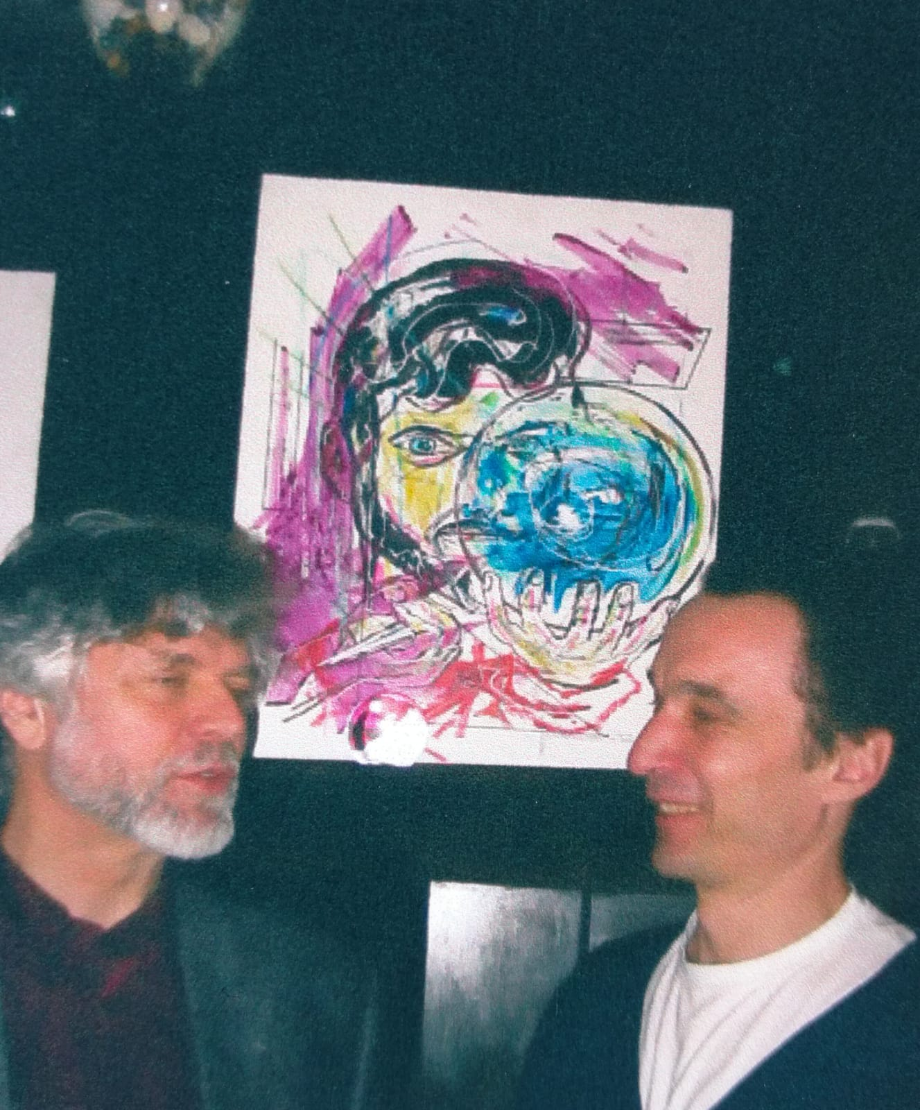 Arnaud de Vregille et Paul Gonez devant le tableau d'Arnaud de Vregille.